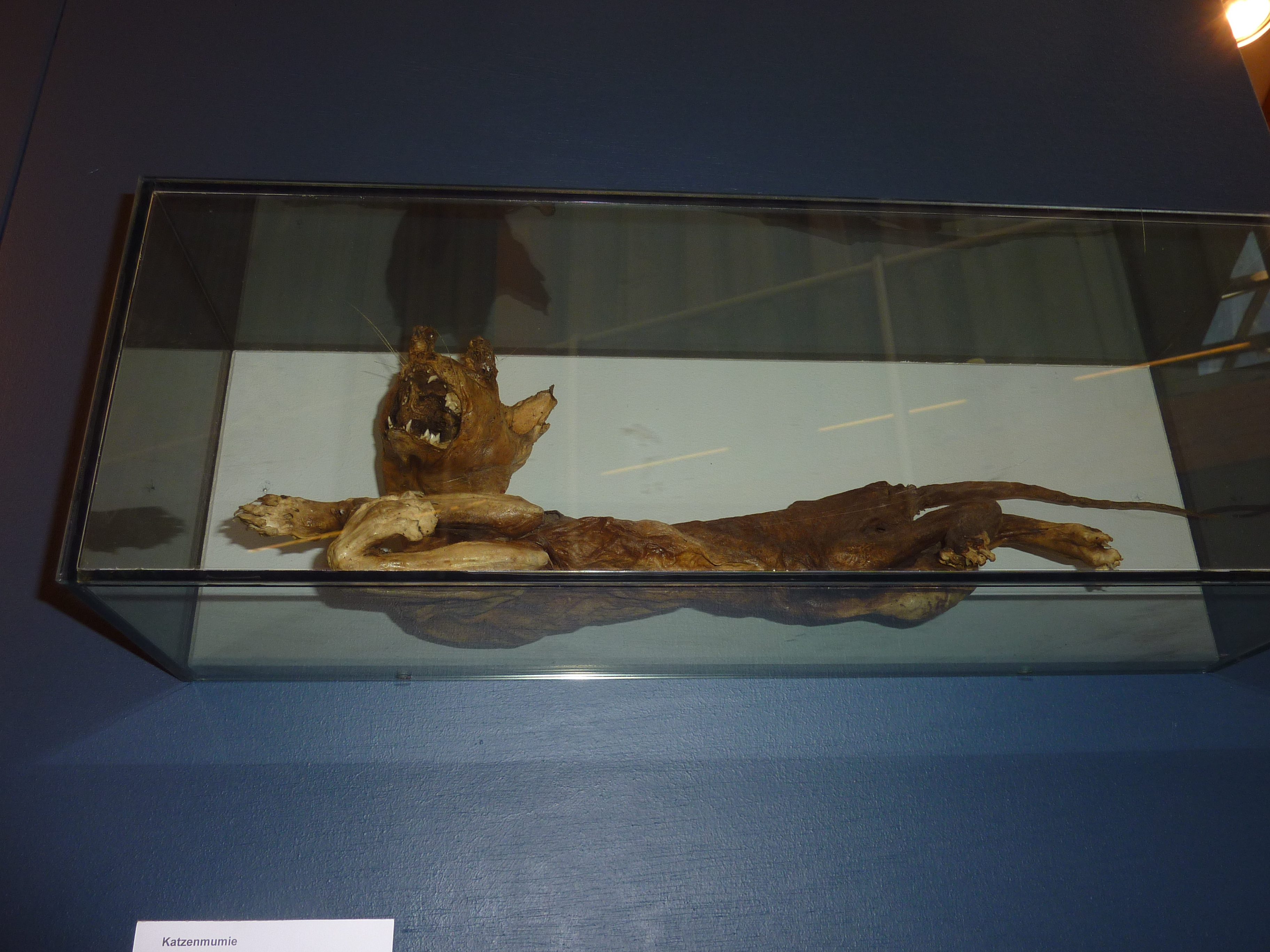 Katze, die in einem landwirtschaftlichen Gerät umgekommen und mumifiziert ist.